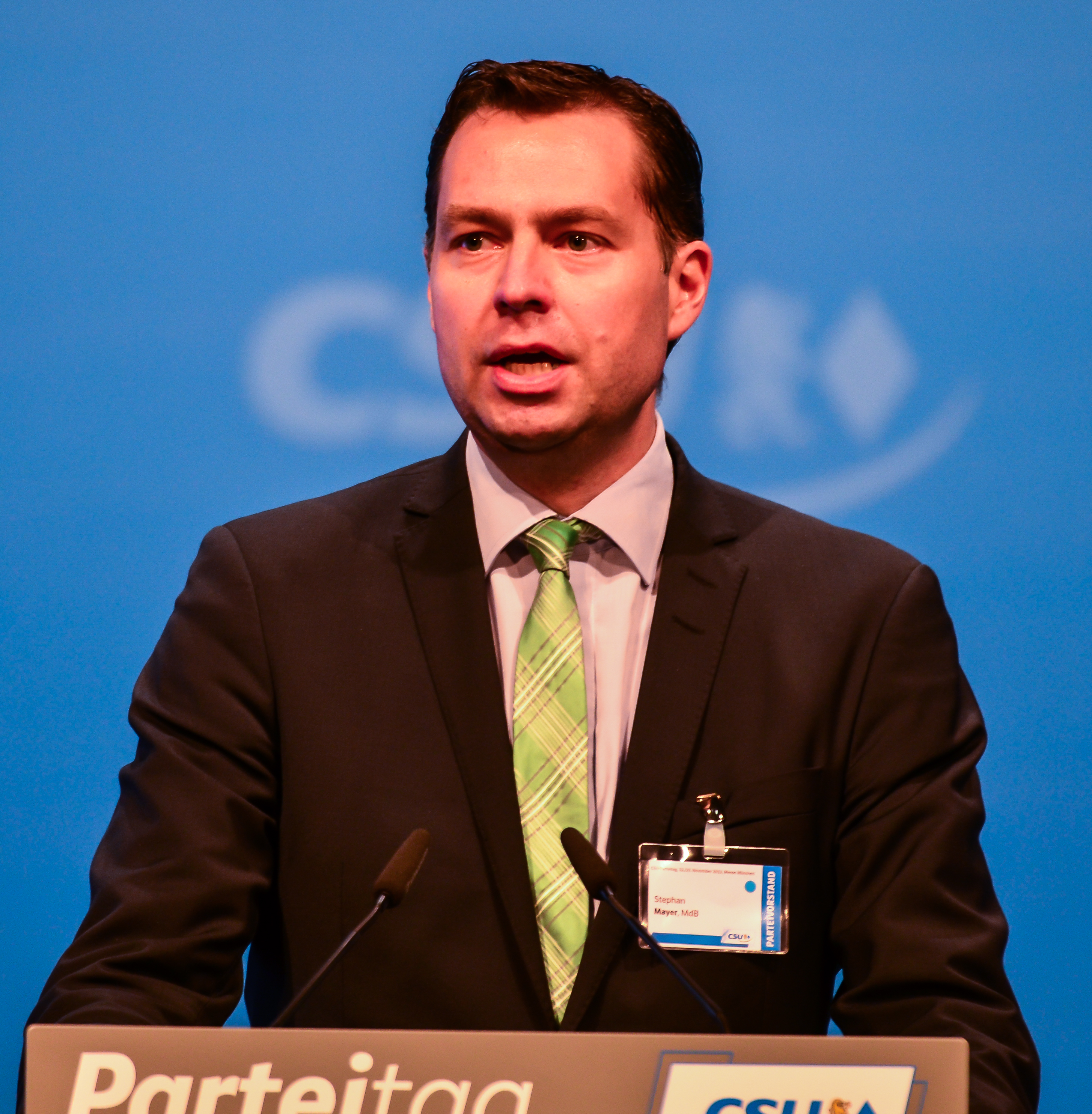 CSU Parteitag 2013 am 23.11.2013 in München